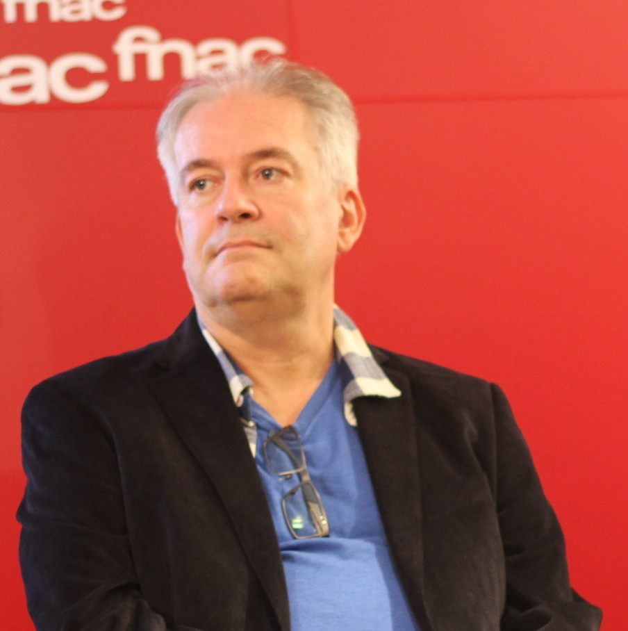 Jean-Yves Ferri, Didier Conrad, Isabelle Magnac